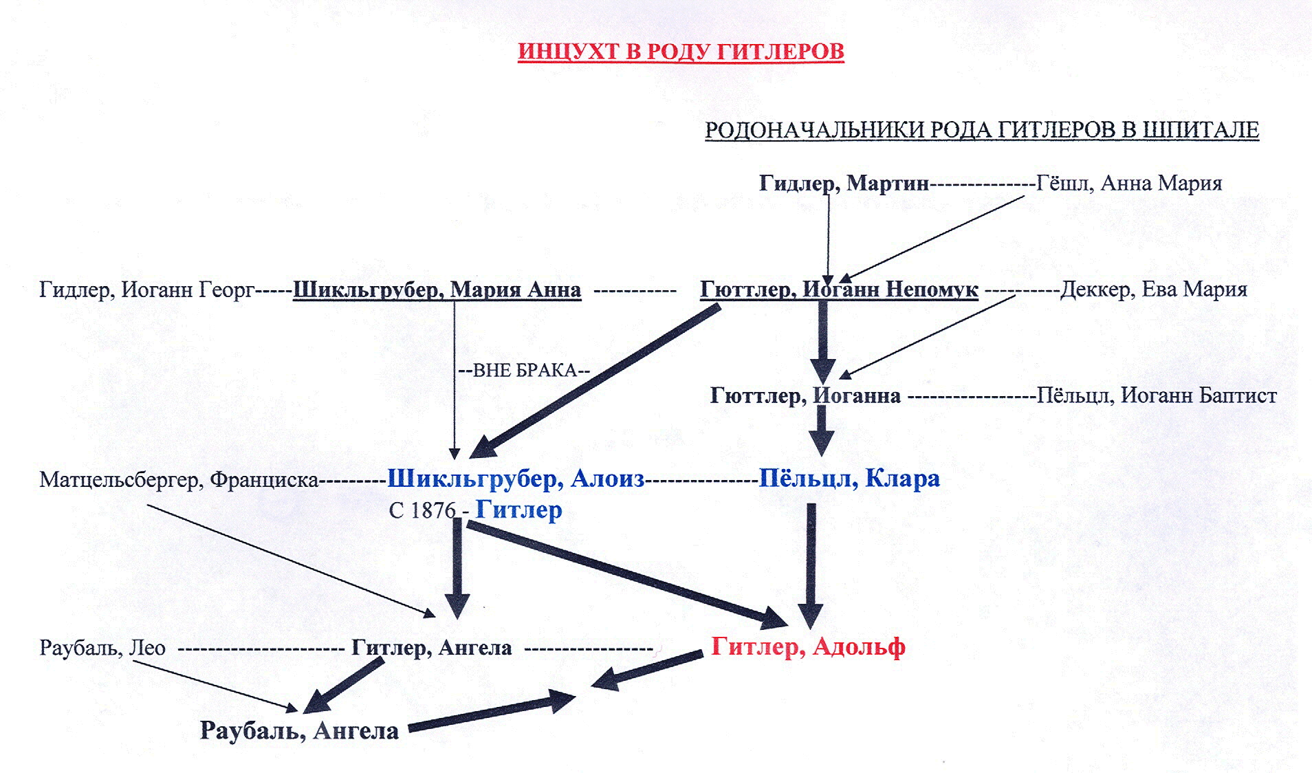 Инцухт в роду Гитлеров